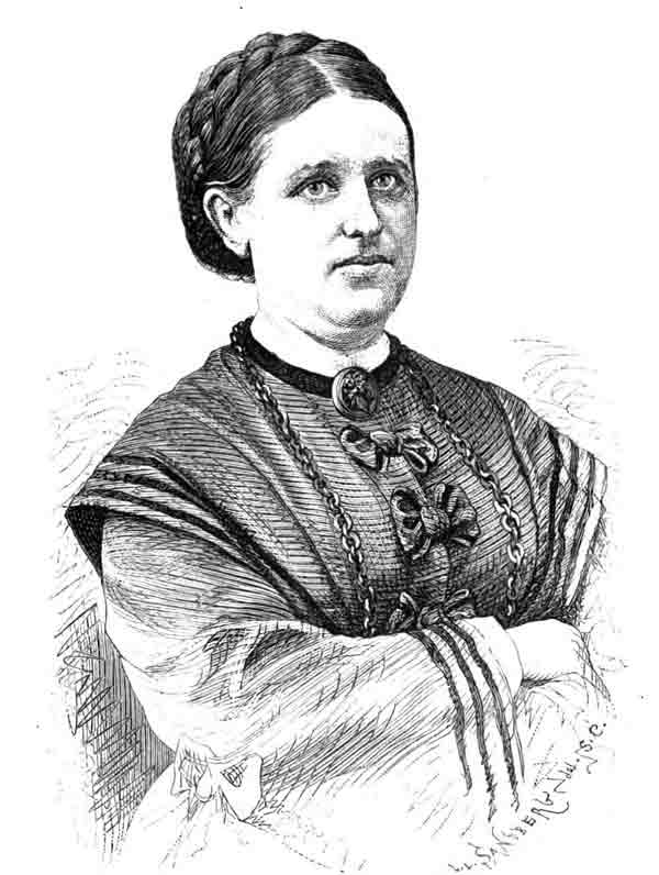 Josefina Wettergrund "Lea"